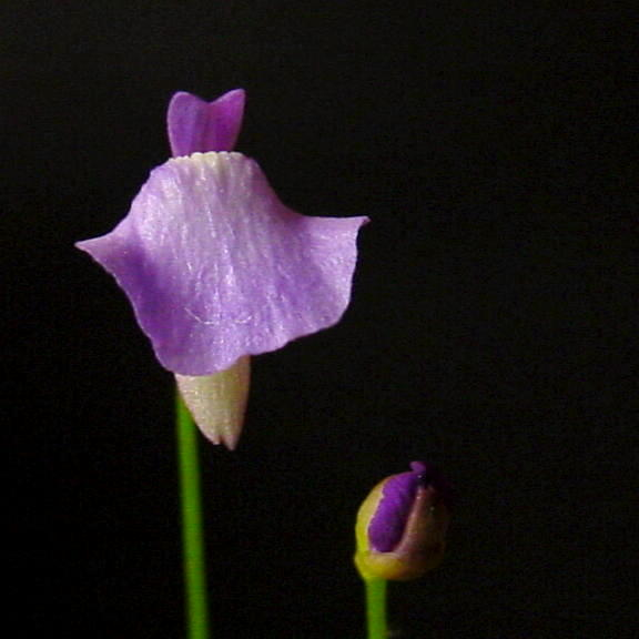 Utricularia lateriflora flower